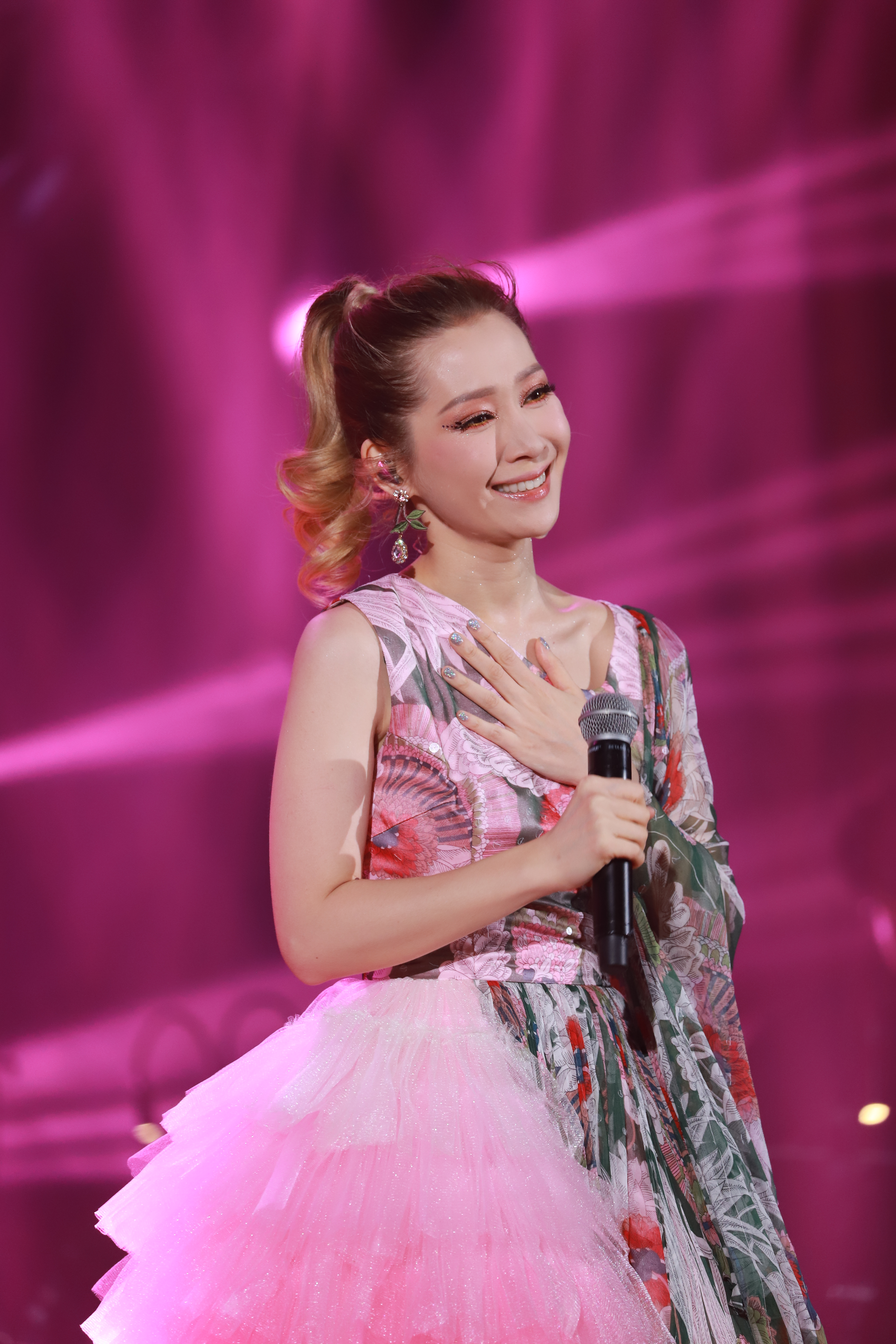 粵語: 2019年7月13日關心妍時刻觸動演唱會2019(廣州站)